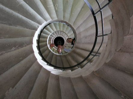 Spiral stairs — Palazzo Ducale (Urbino).